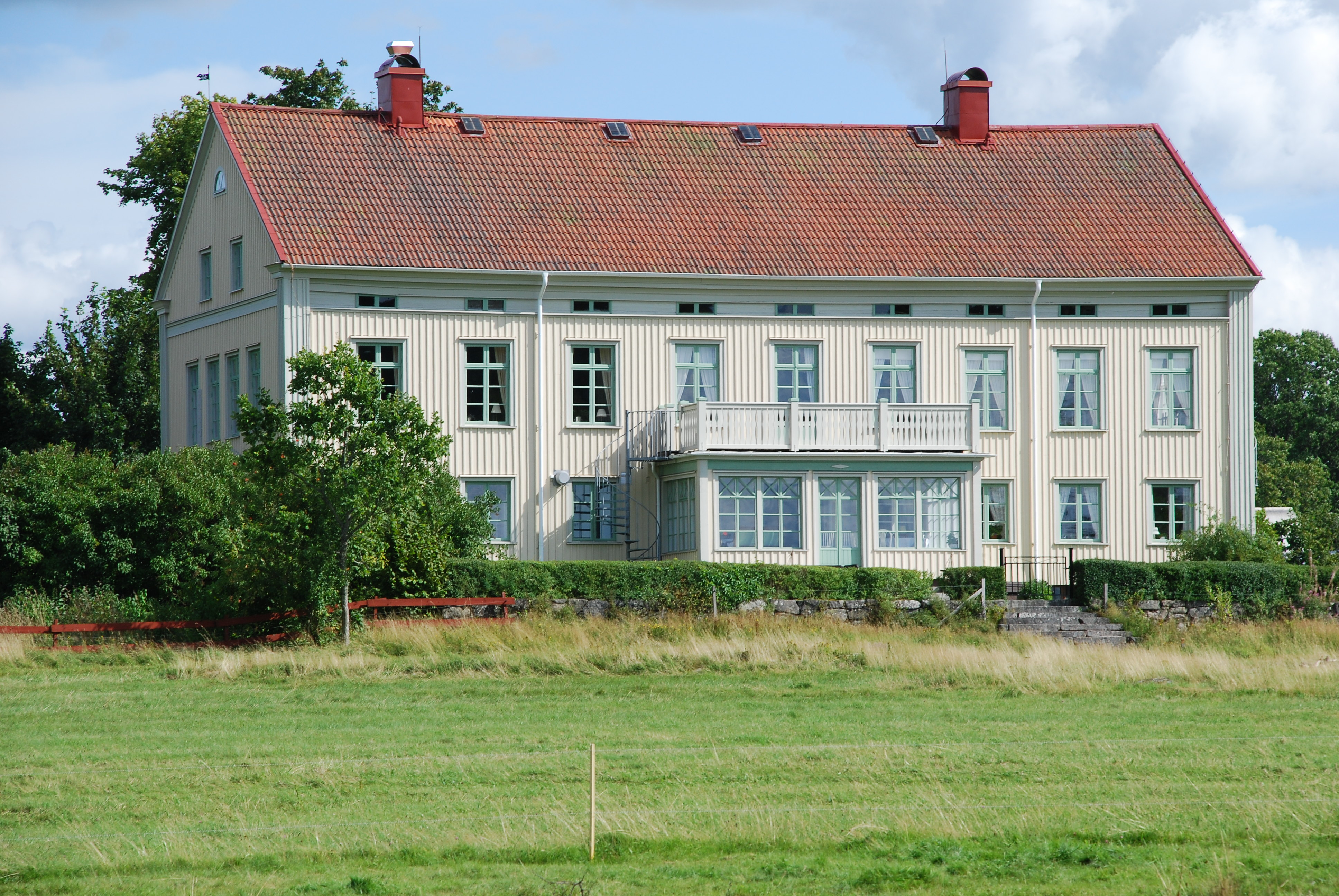 Osaby herrgård från sjösidan